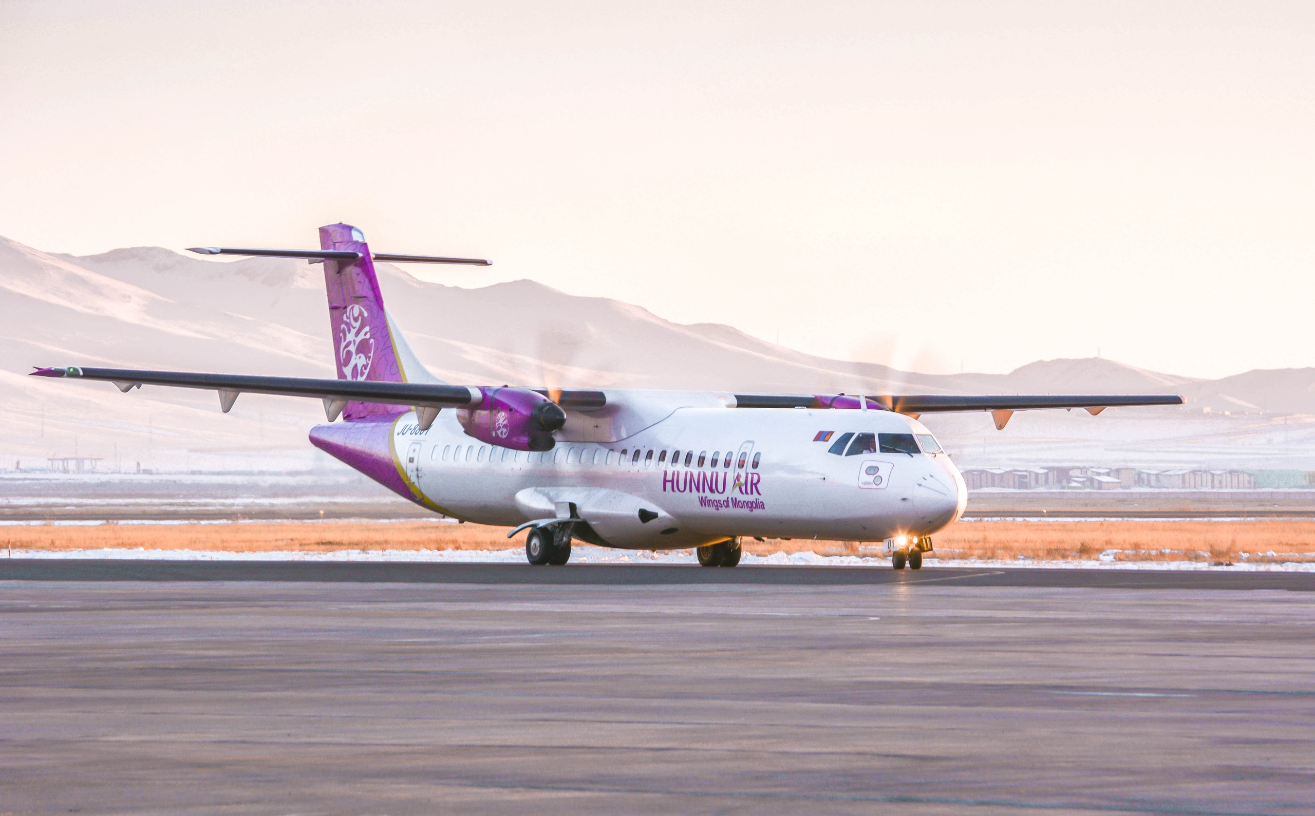 ATR-42-500 в аэропорту Улан-Батора авиакомпании Hunnu Air